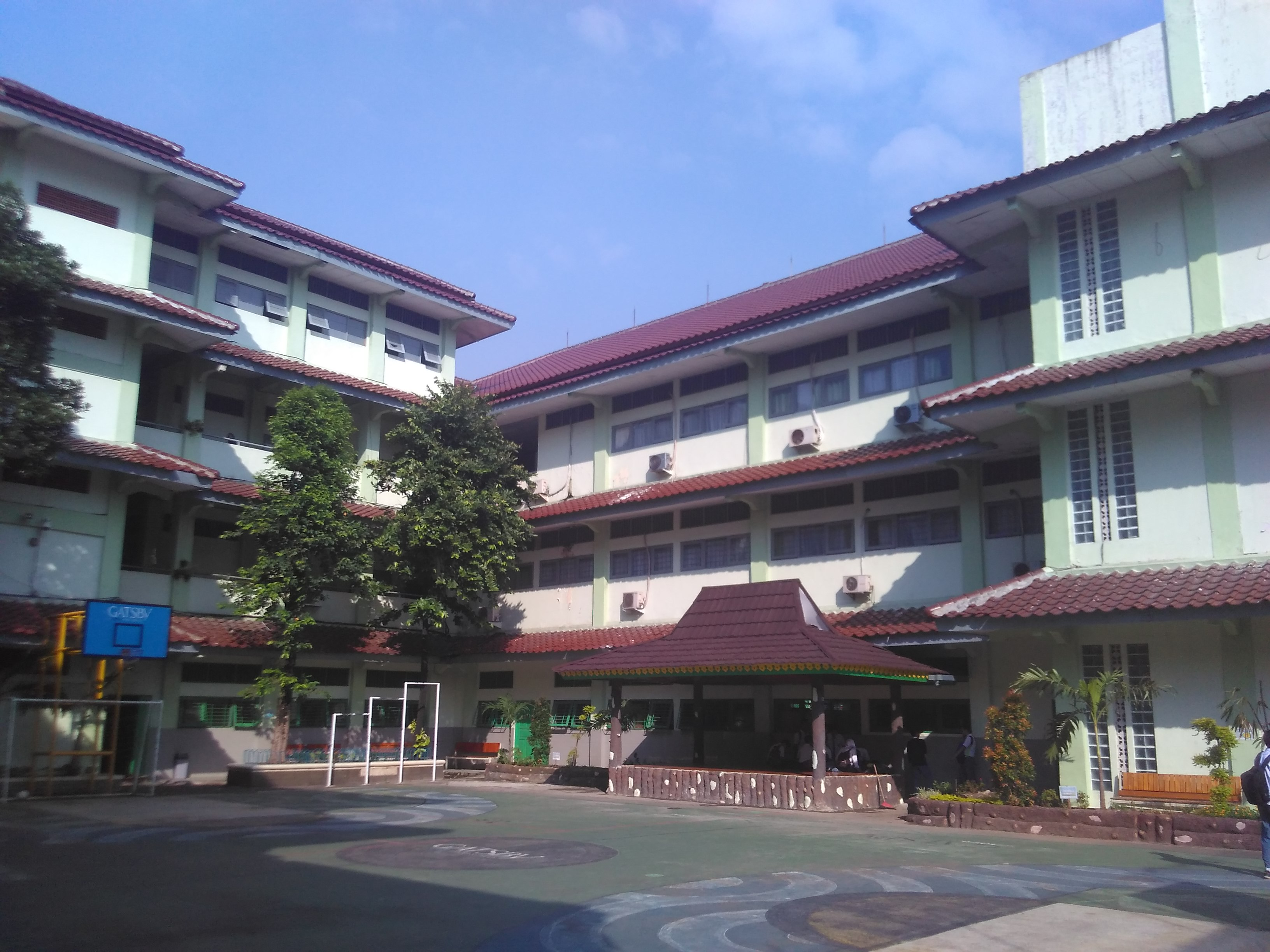 Tampak halaman depan sekolah pada sore hari.